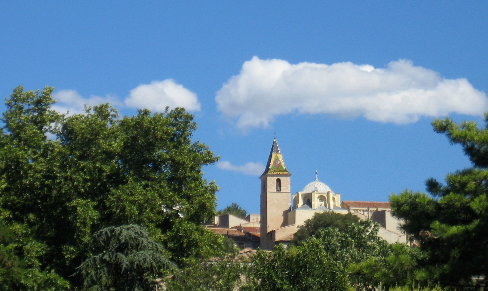 village d'Allauch